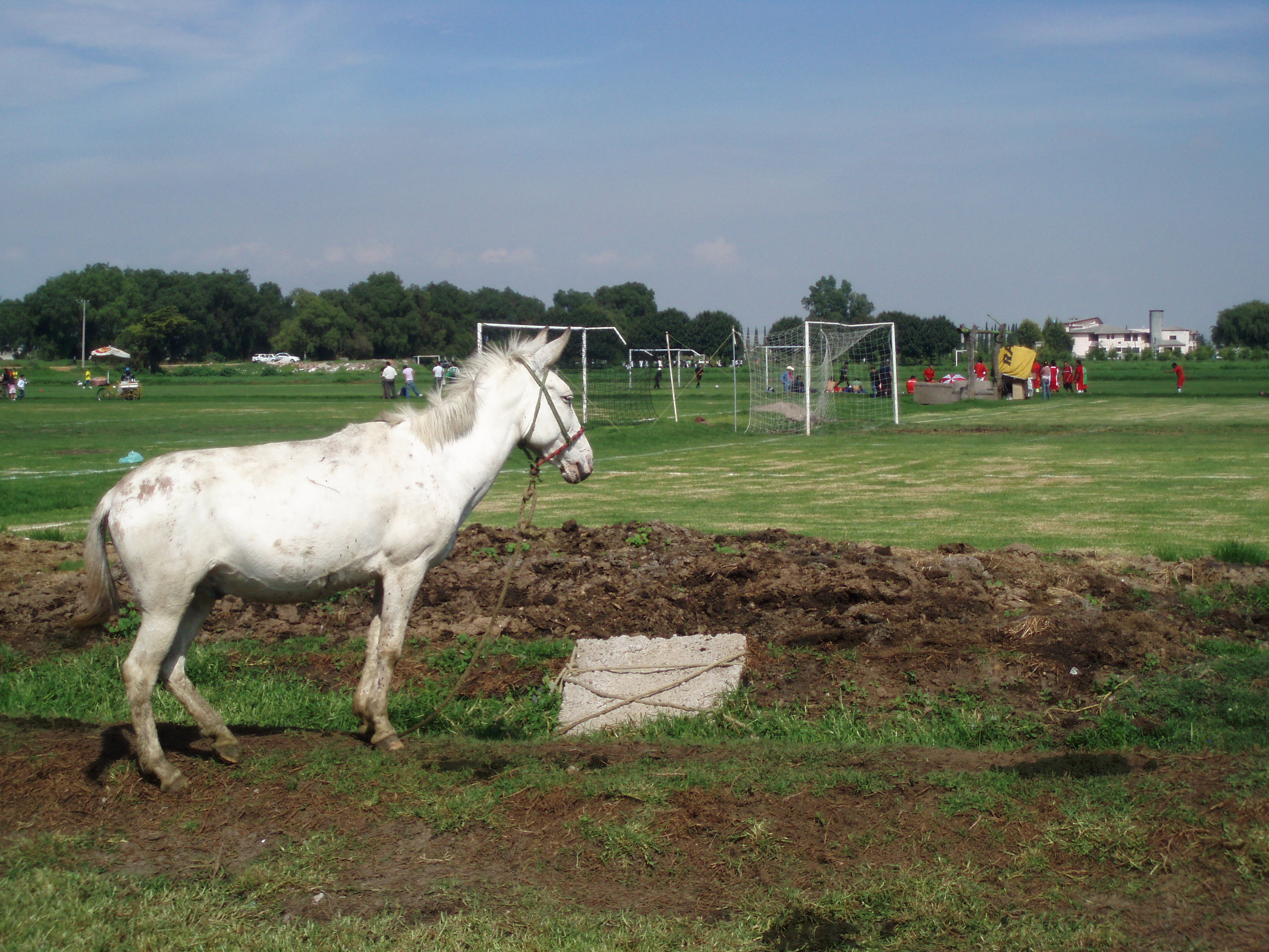 Caballo aficionado